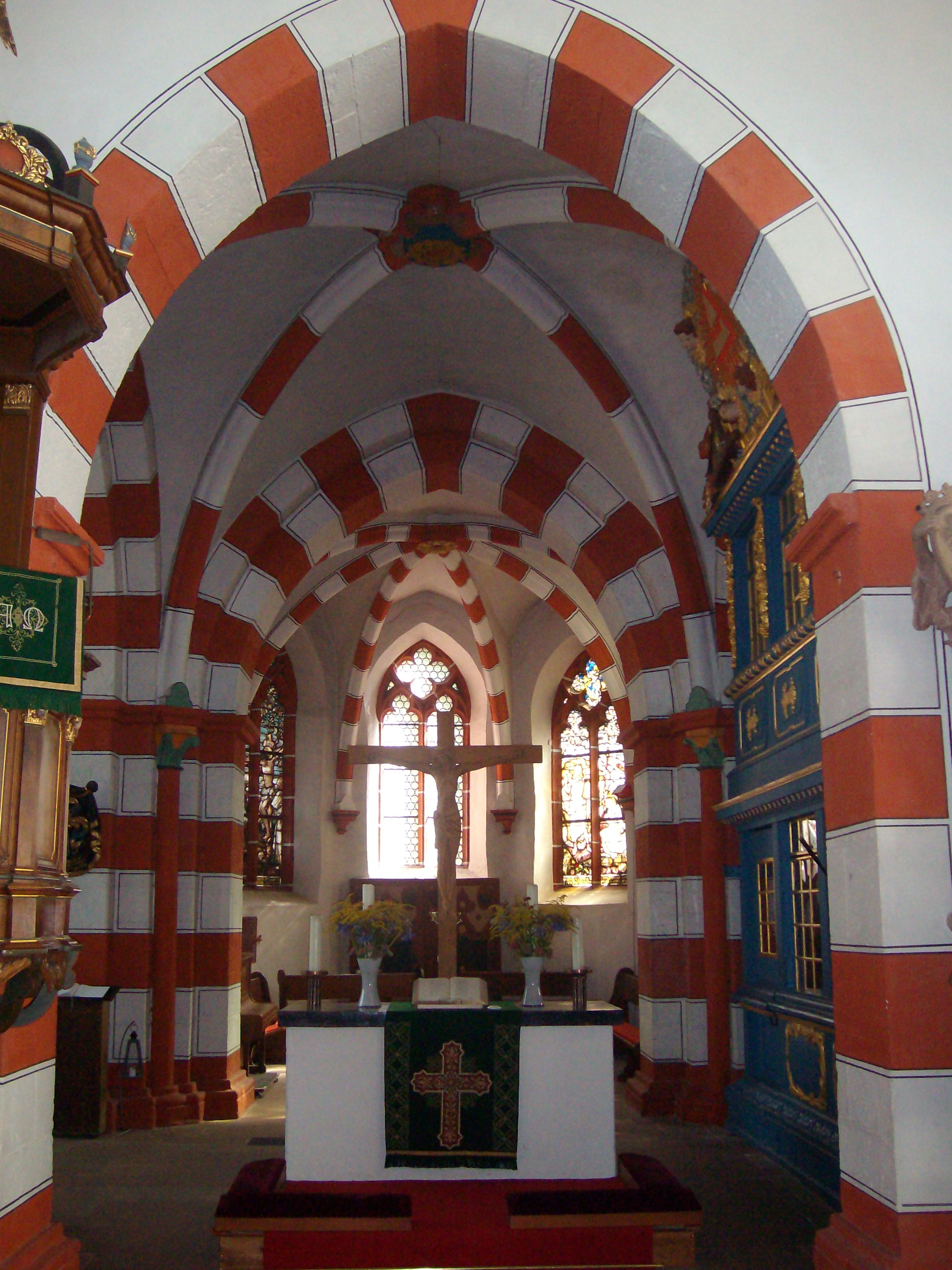 Chor der Evang. Stadtkirche in Laubach, Hessen